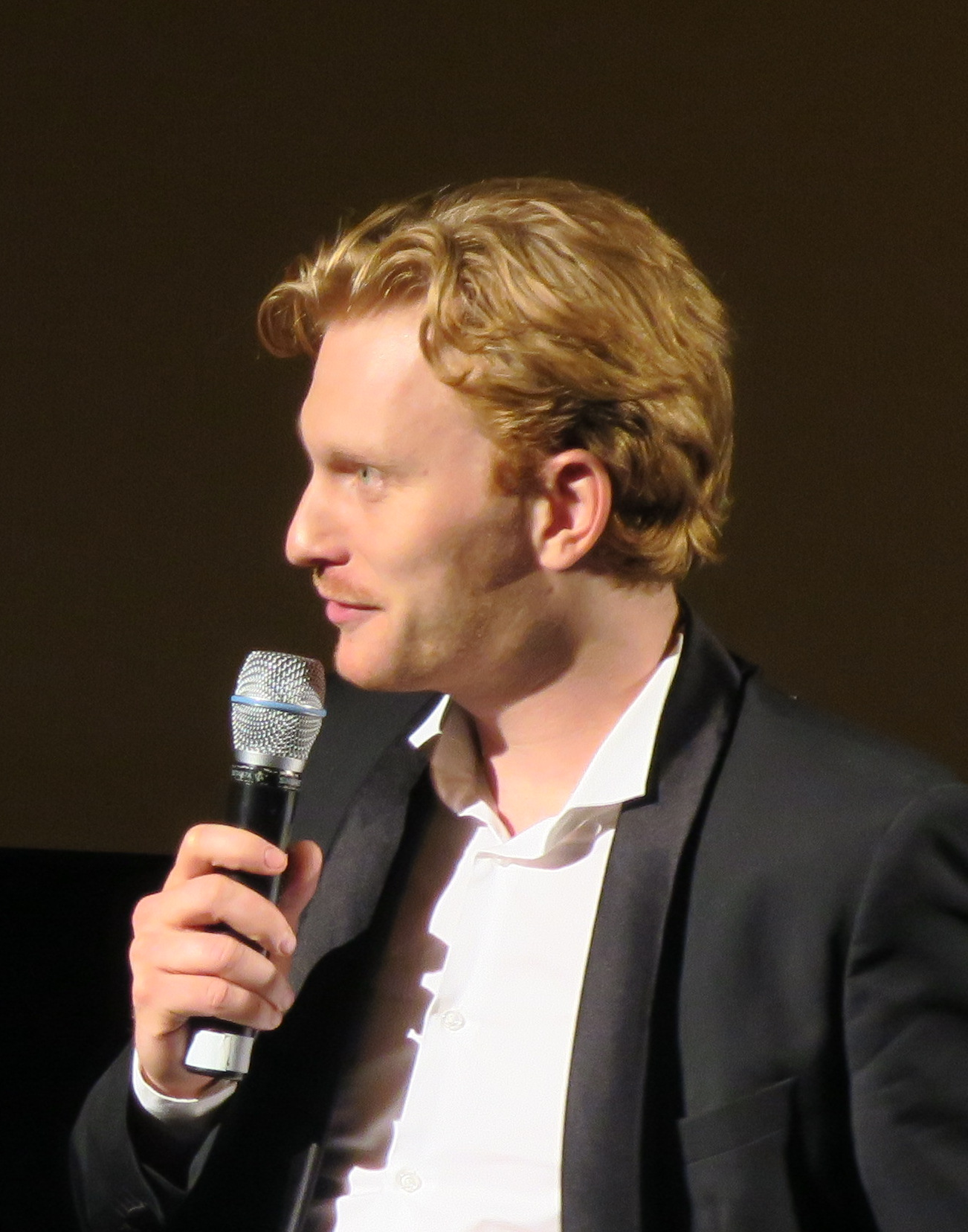 Lucas Prisor nach der Vorführung von "Elle" beim Hamburger Filmfest 2016